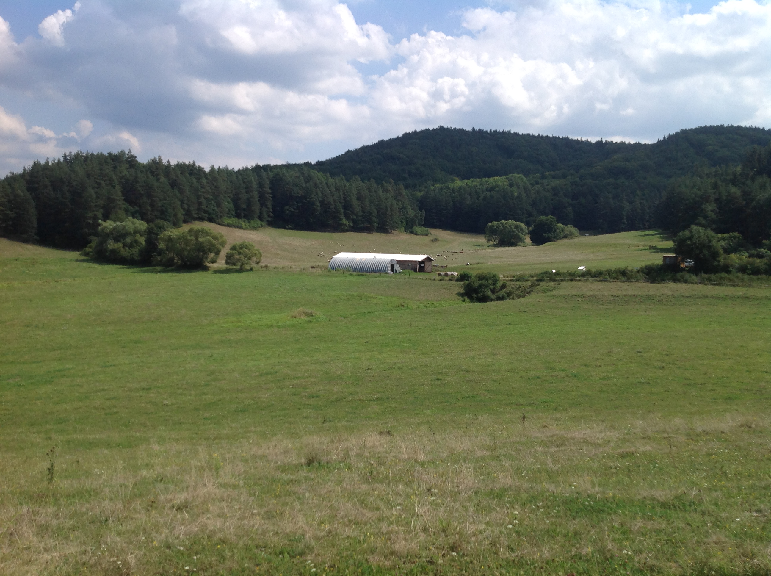 Salaš v Sampore